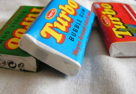 Guma Turbo, una din cele mai iubite gume ale romanilor